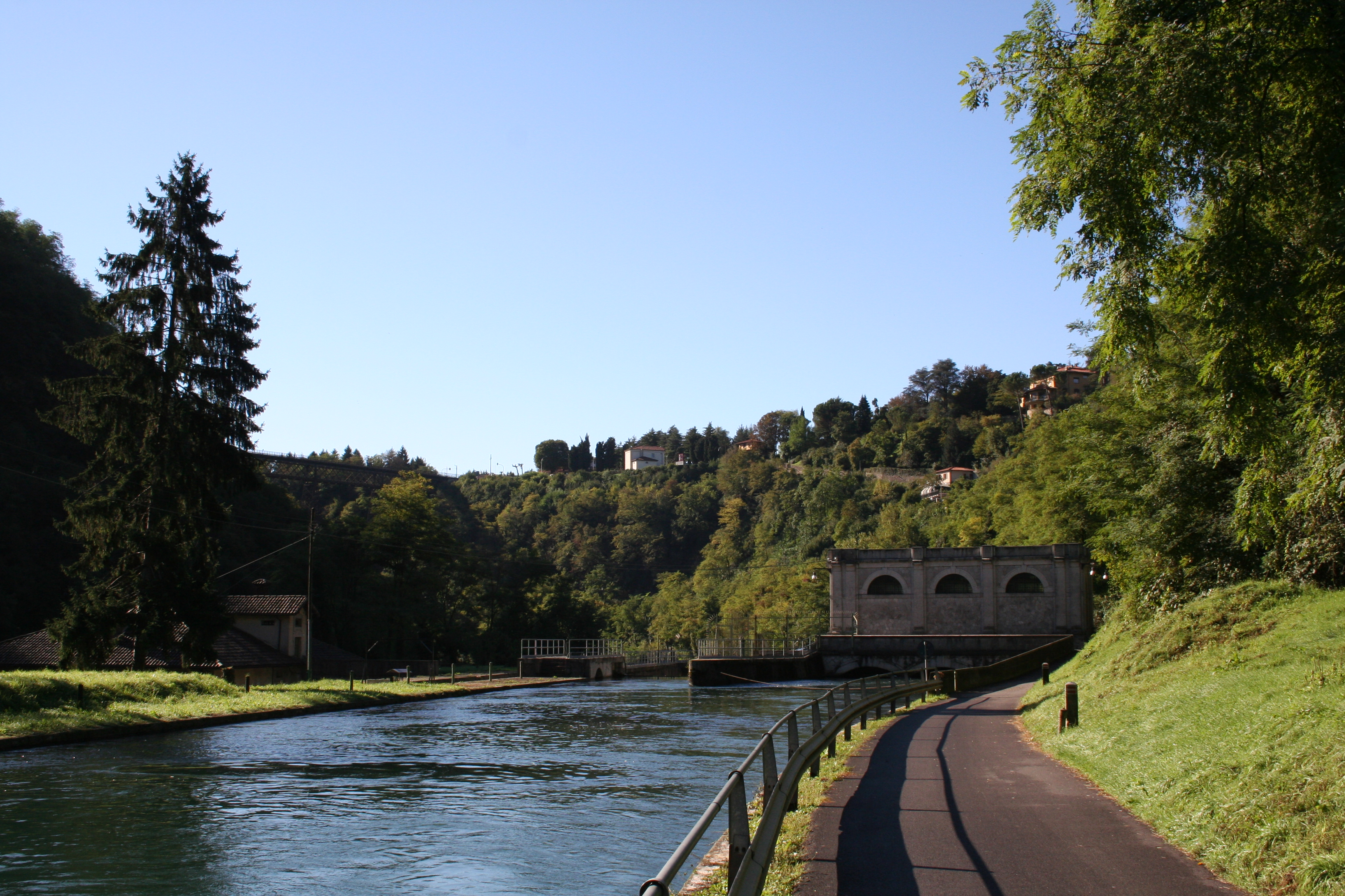 Autore Giorces. L'Adda tra Calusco e Paderno d'Adda.